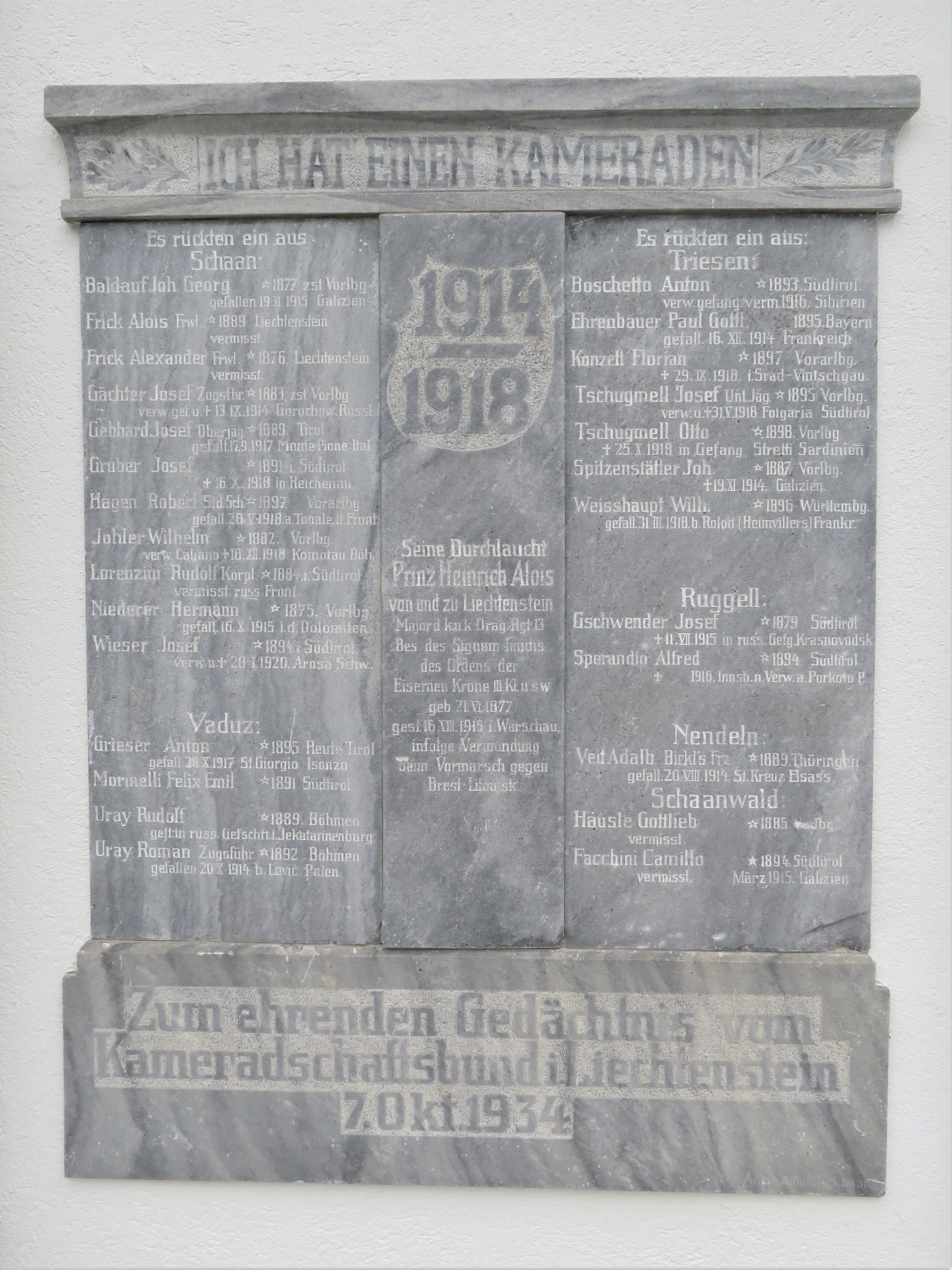 Gedenktafel für die Gefallenen des 1. Weltkriegs an der Friedhofskapelle in Schaan, Liechtenstein.